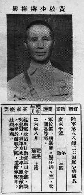 抗戰軍人忠烈錄第一輯中的烈士遺像